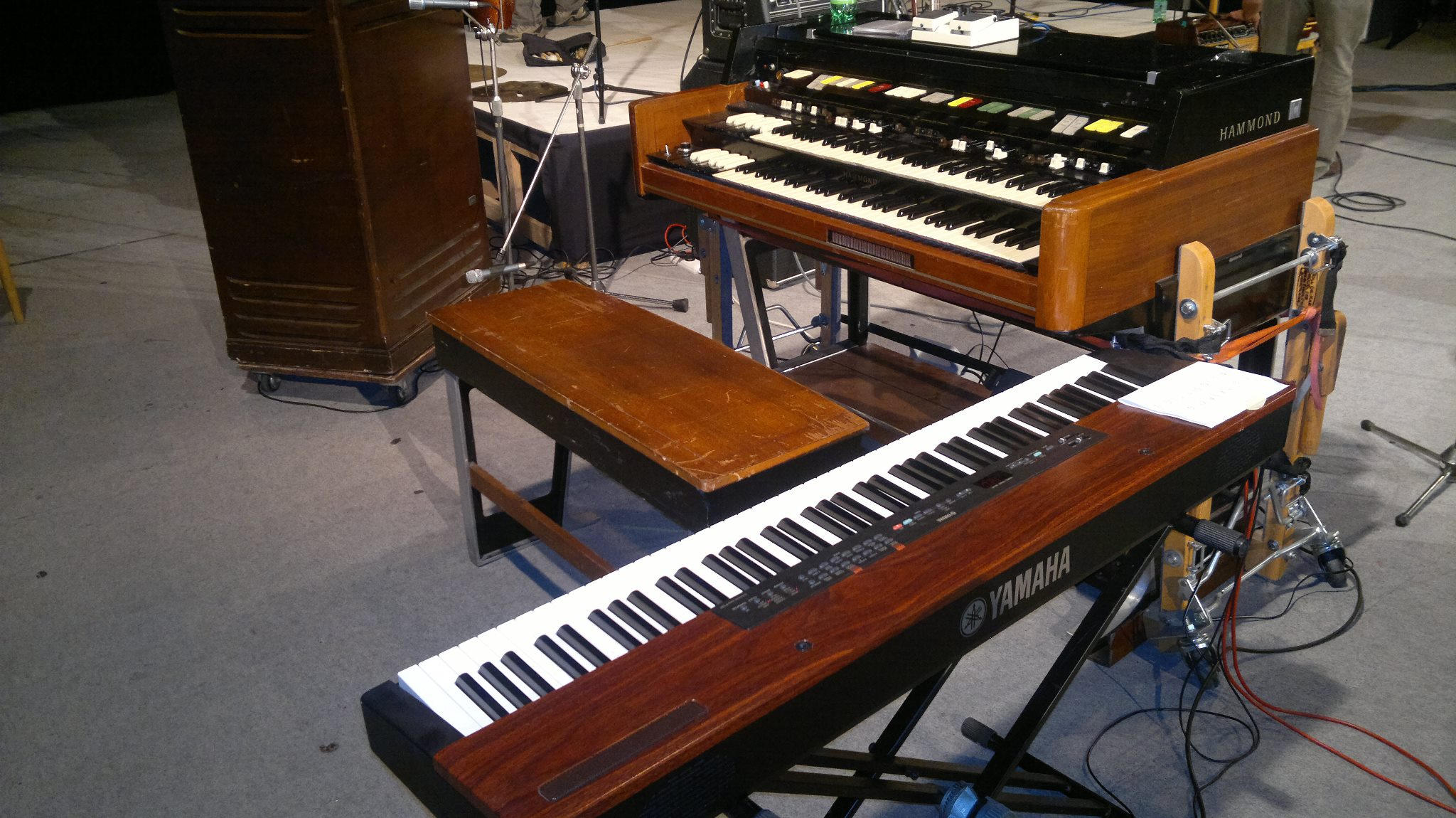 Hammond a syntetizator Mariana Vargu